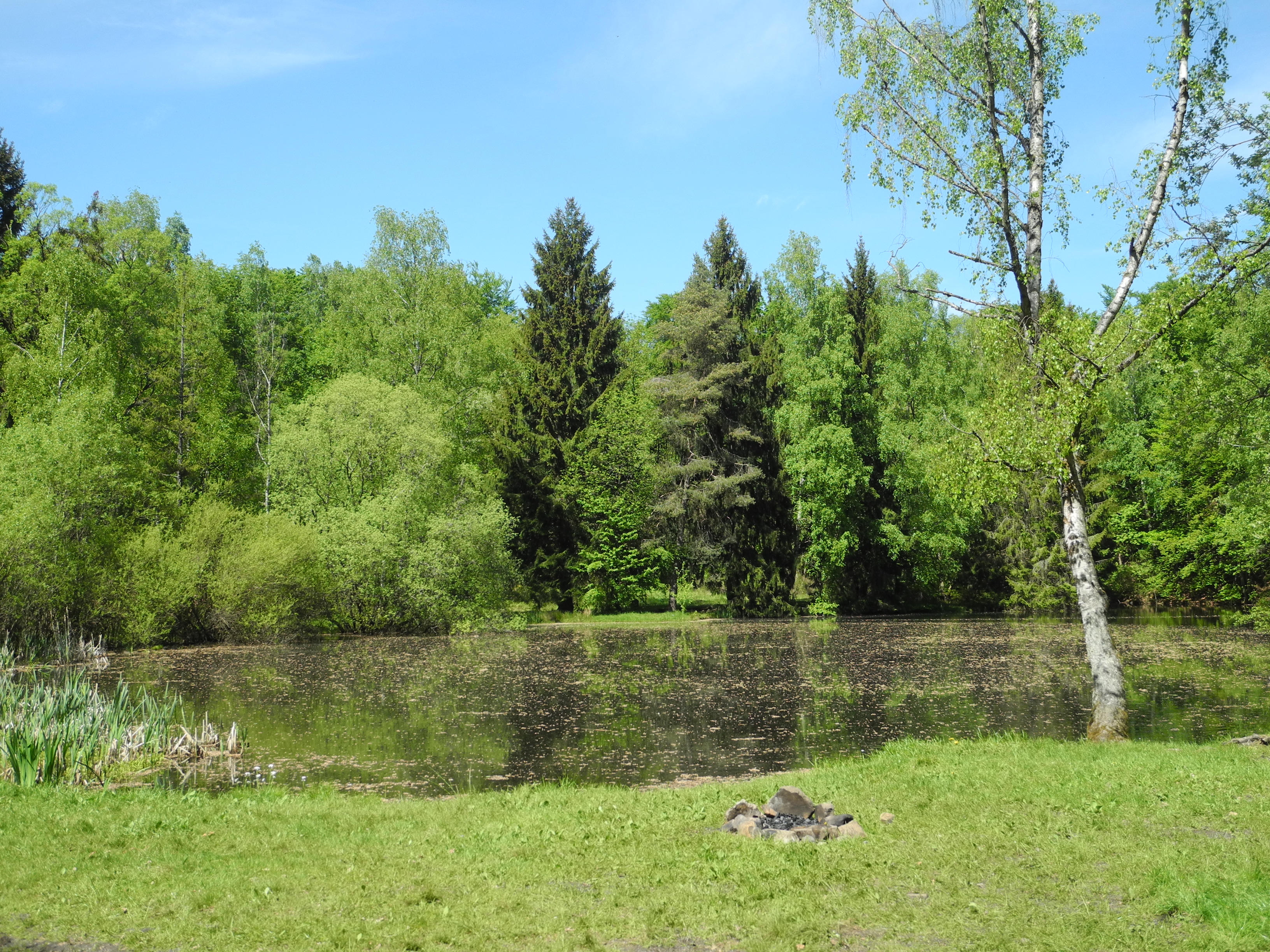 Grüner See, im Wald bei Eiterhagen im nordhessischen Landkreis Kassel.